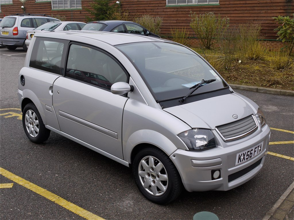 505cc 2 cylinder petrol 65mpg. Panasonic G1 14-45 Lens